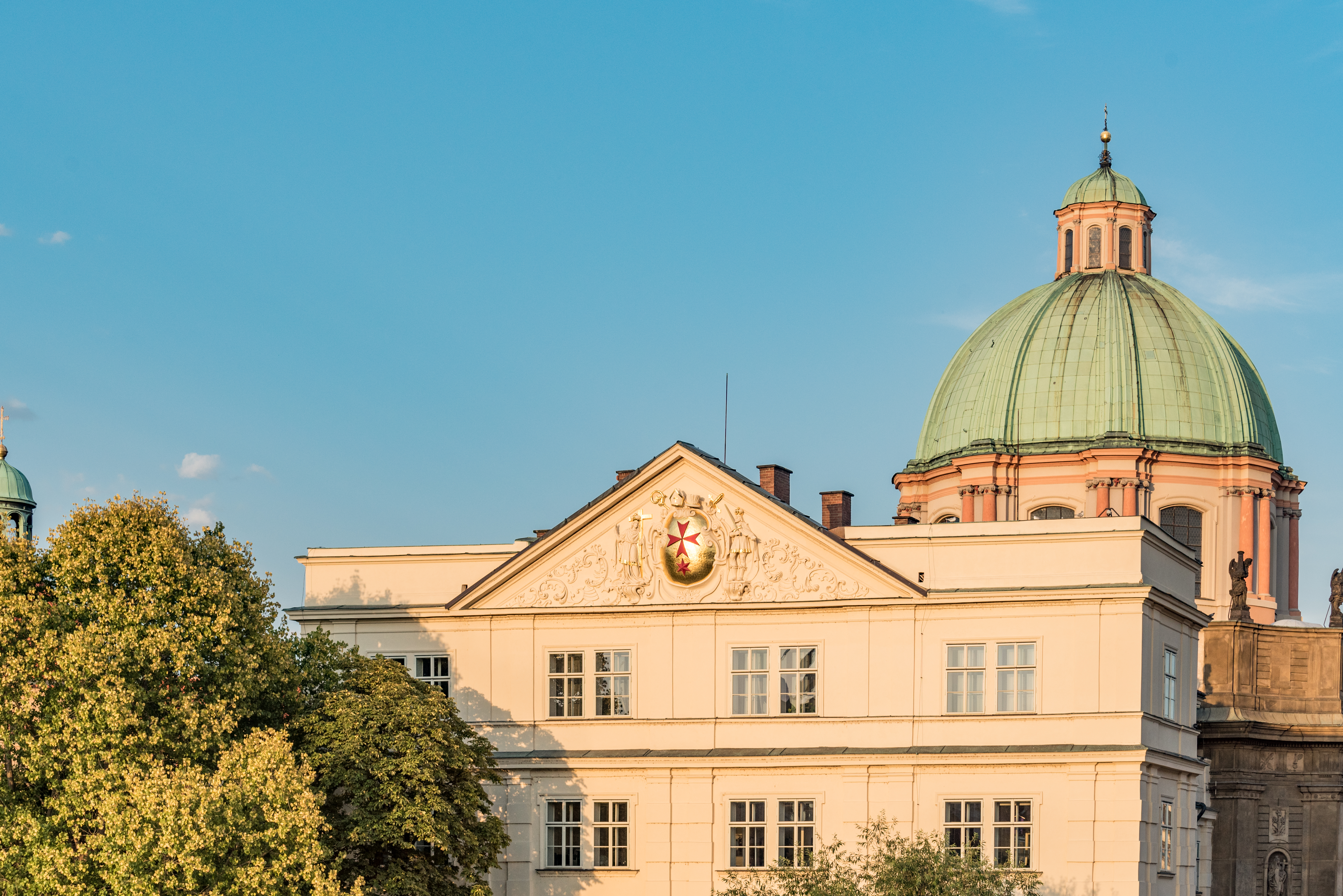 Praha 1, Křižovnické náměstí 191-3, Křižovnická, Klášter křižovníků s červenou hvězdou